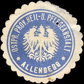 Sealing stamp Title: Ostpreussische Provinz Heil - und Pflegeanstalt - Allenberg Description: hellblau, weiß, geprägt Place: Allenberg size: 4 cm